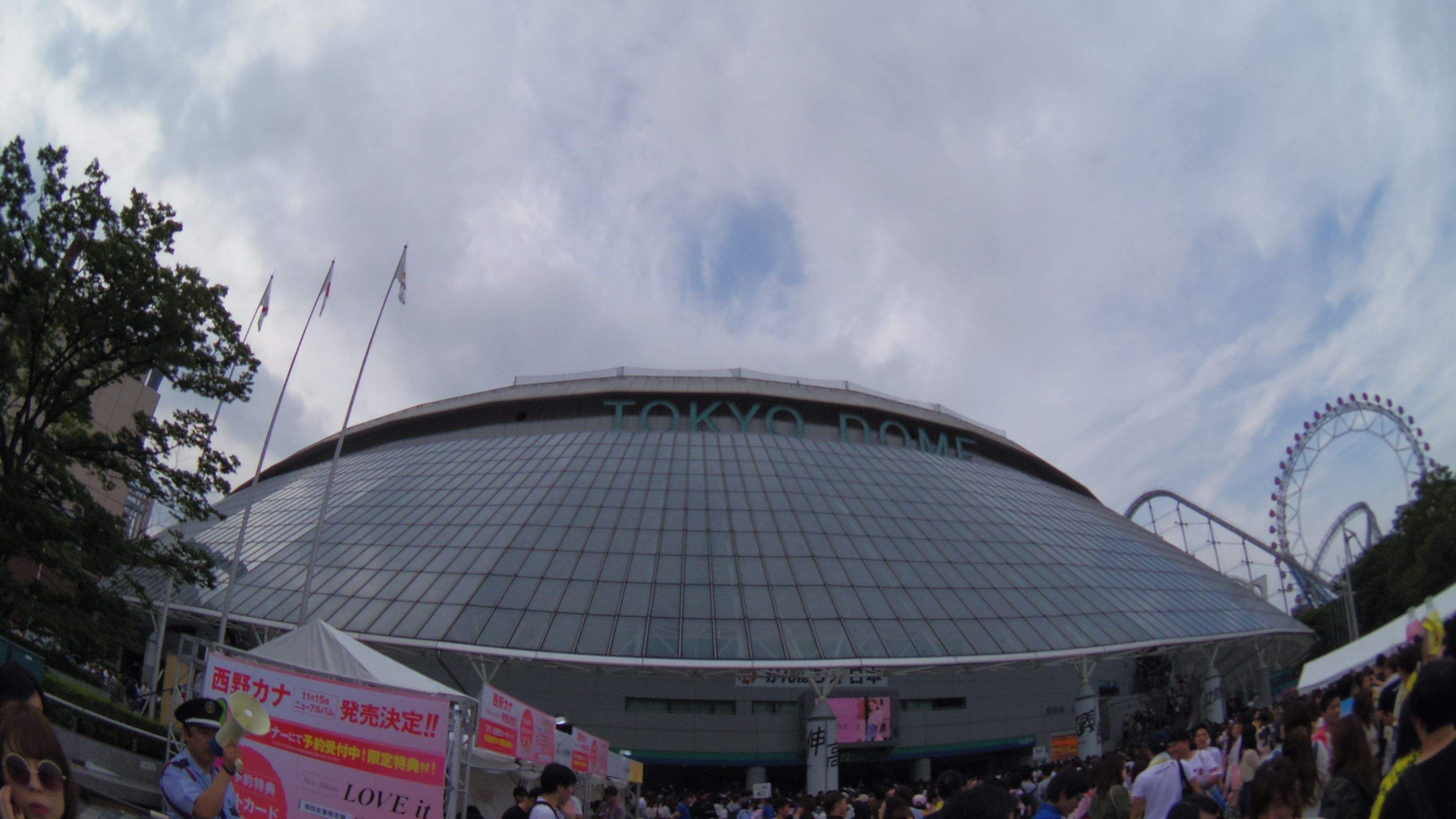 東京ドーム（東京都文京区後楽）外観（2017年9月24日撮影）。